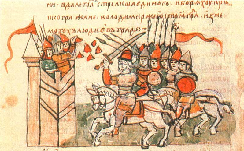 Radzivill chronicle. Siege of Korsun in 988. Поход князя Владимира на Корсунь.